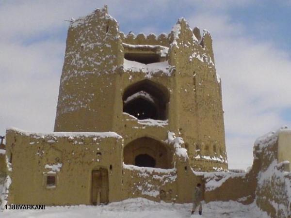 عکسی از روستای ورکان در ایران زمستان است